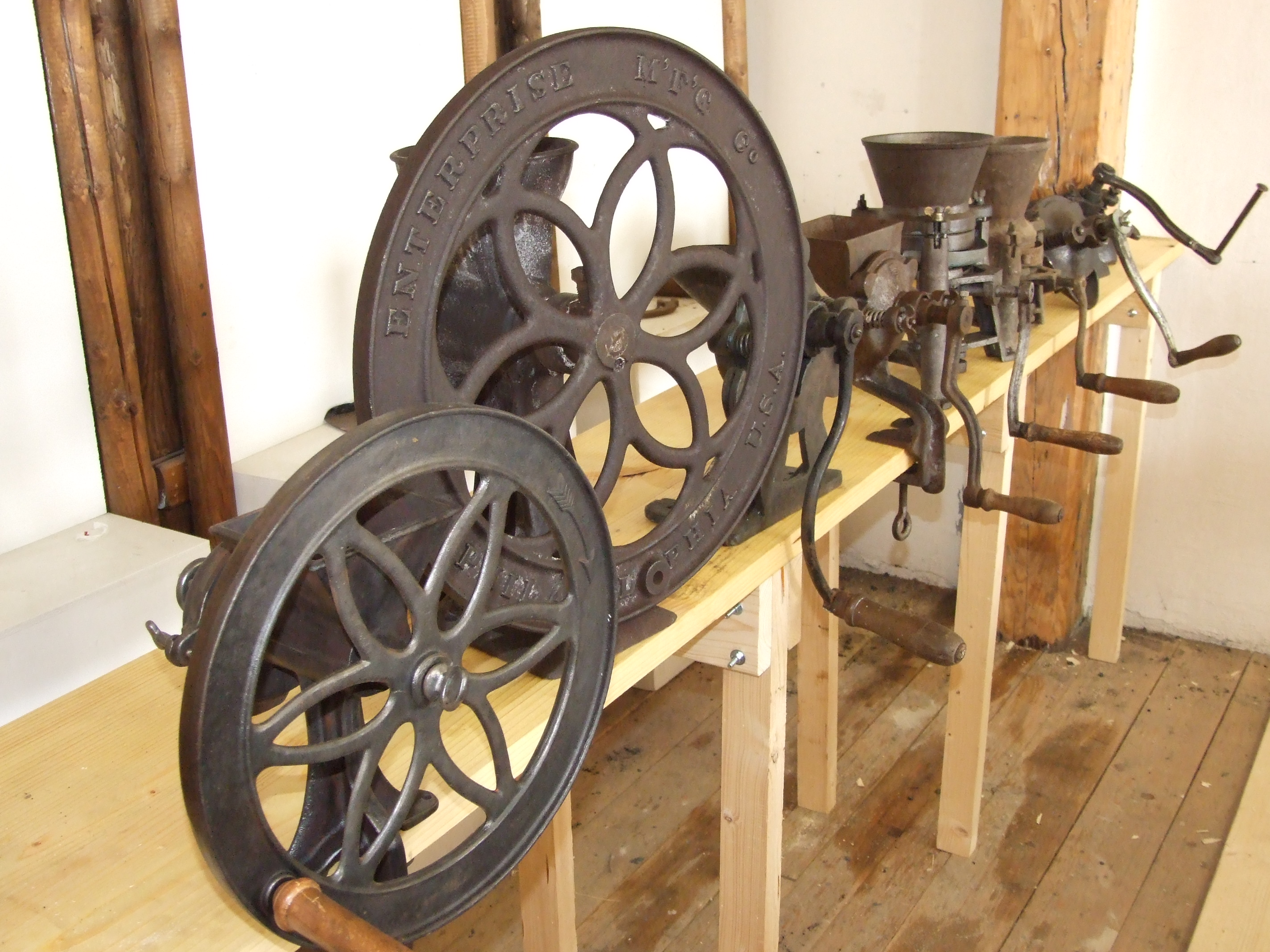 část expozice šrotovníků